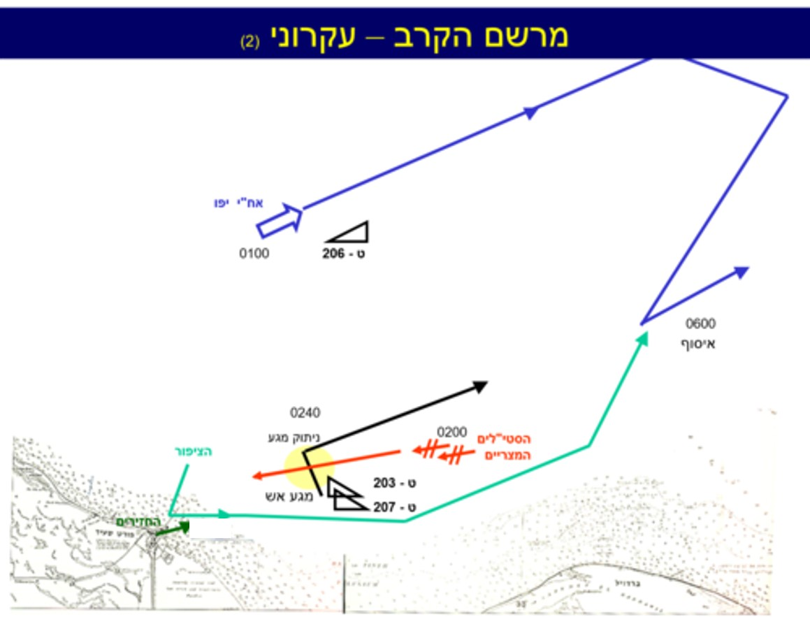 תרשים תנועת כלי השיט בפעולת פורט סעיד 1967